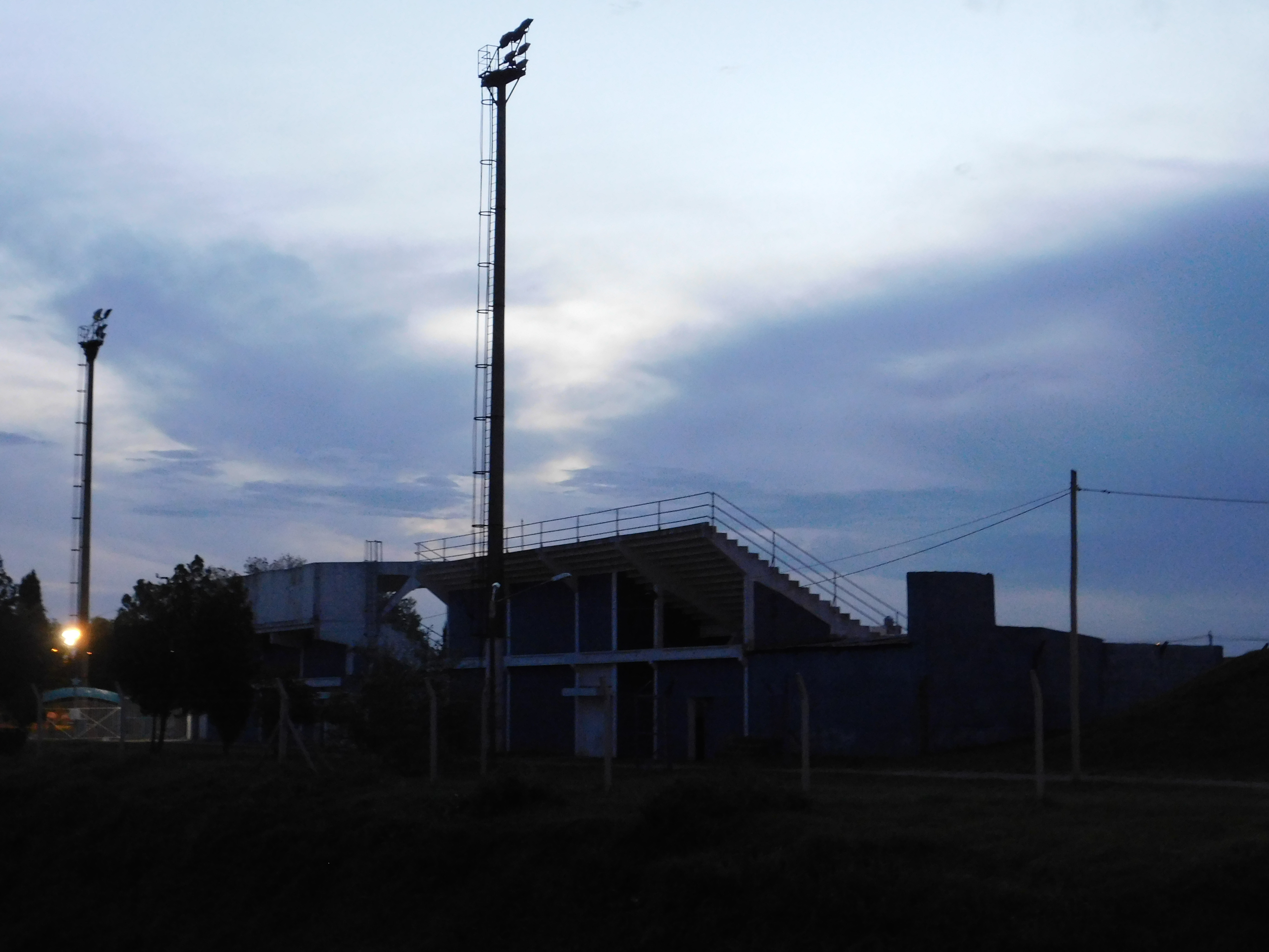 Estadio